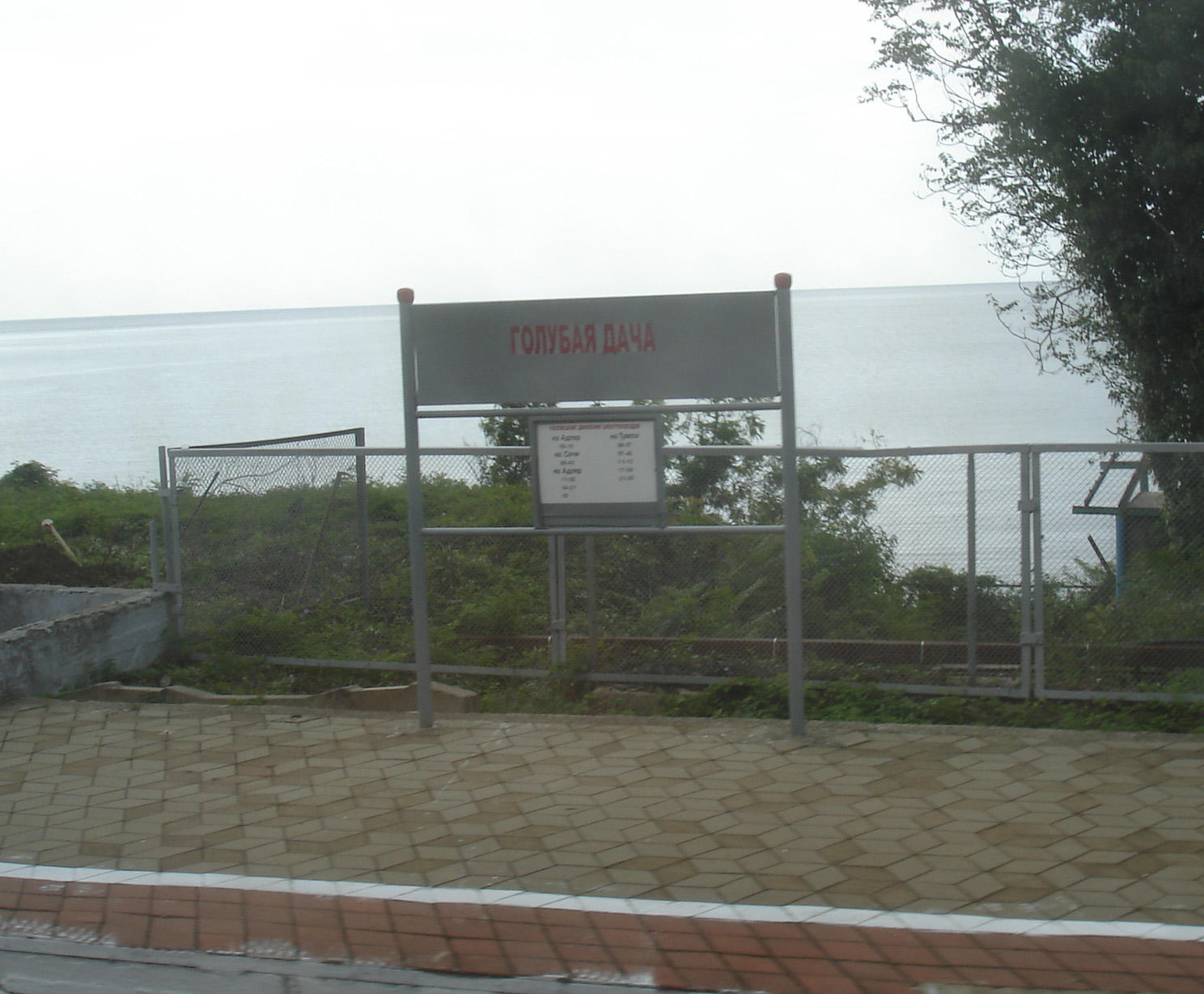 Железнодорожная станция Голубая Дача